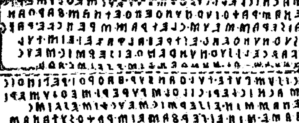 Liber Linteus Zagrabiensis